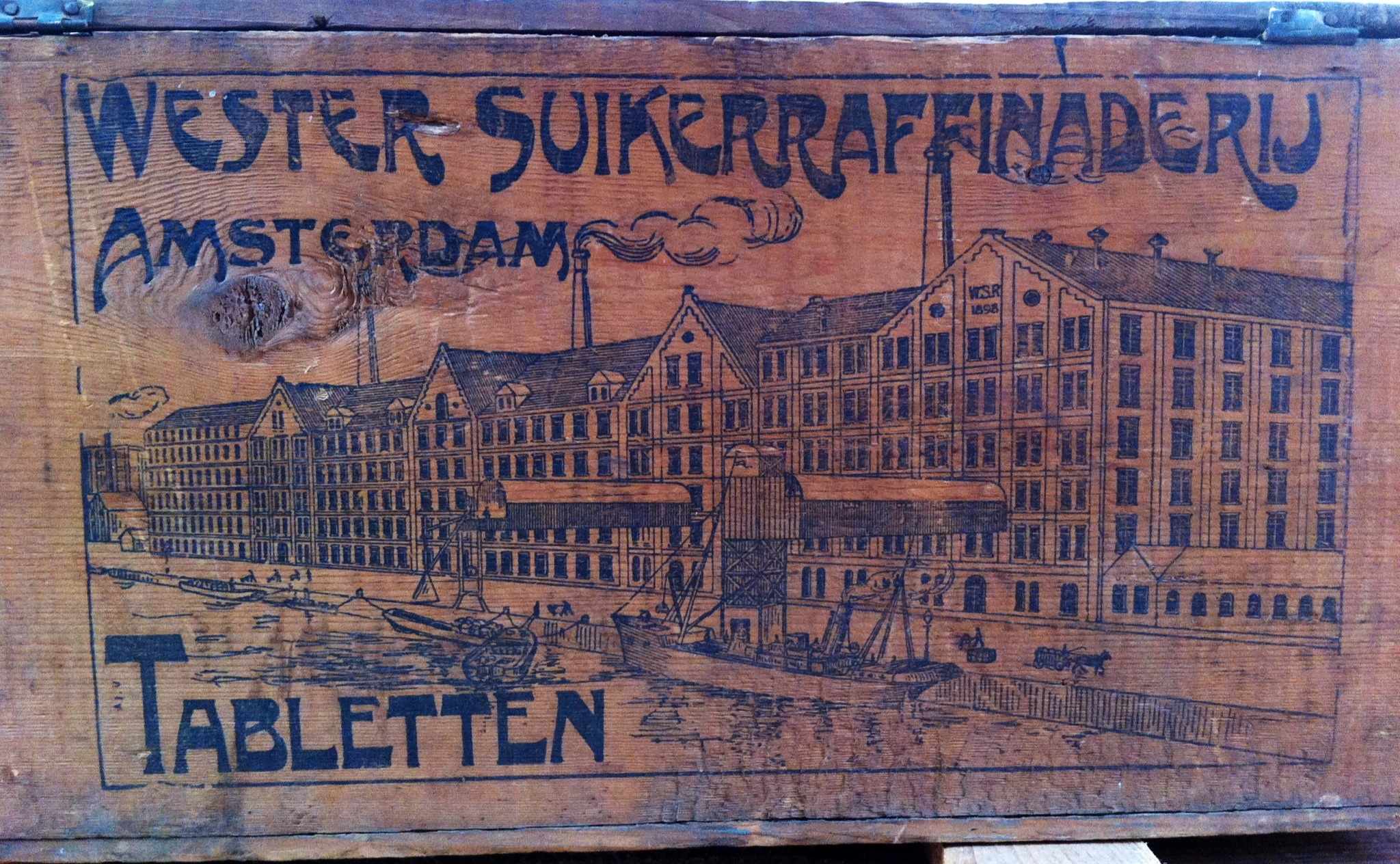 Wester suikerraffinaderij Amsterdam